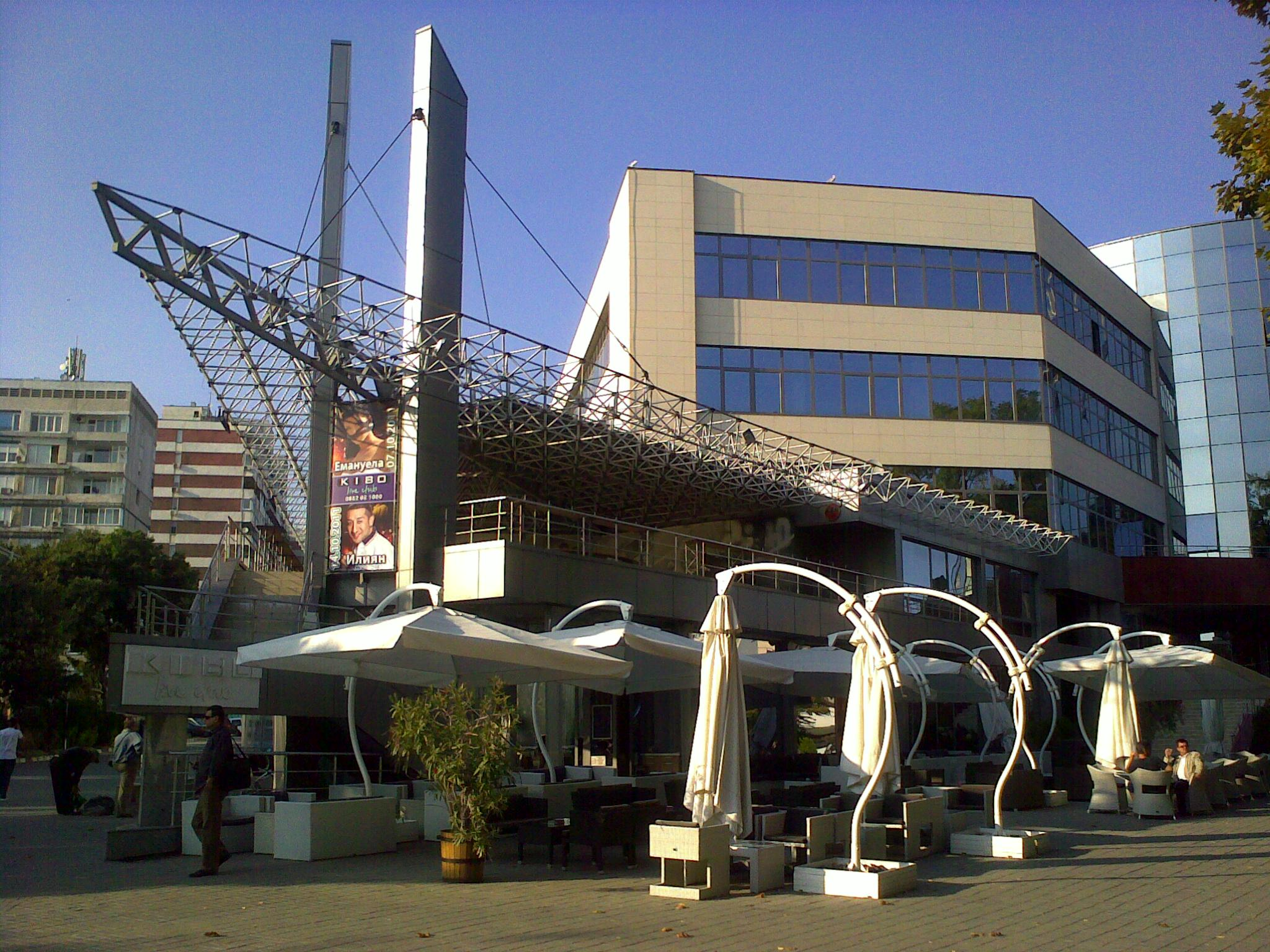 Burgas, Bulgarien - Freie Universität Burgas, neues Gebäude. 2004 Gebäude des Jahres